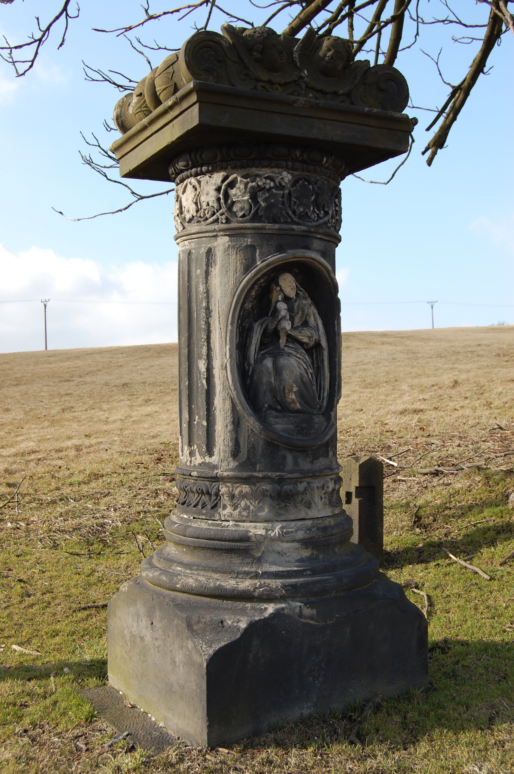 Kulturní památka krucifix u Nakléřova